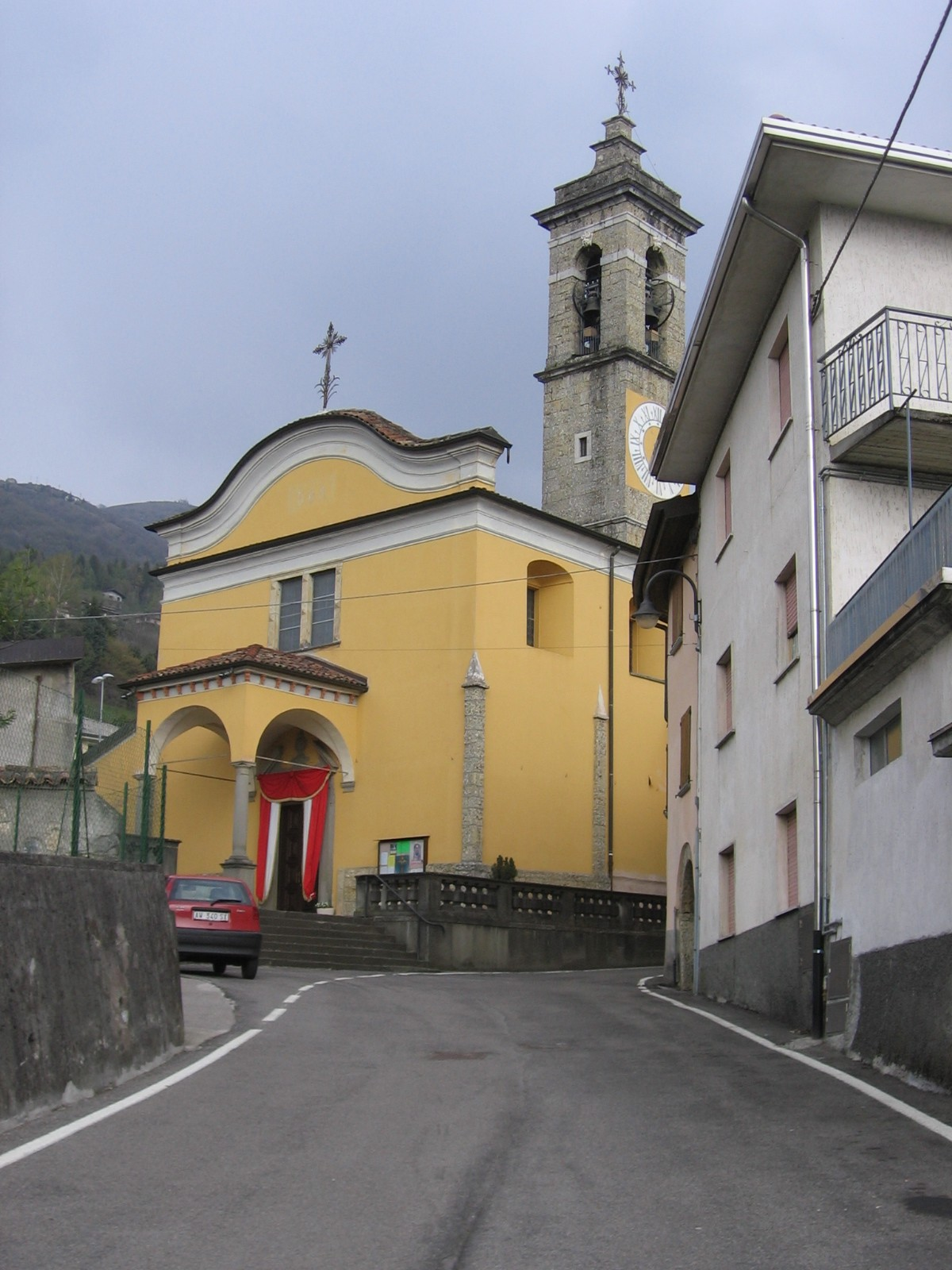 Cazzano Sant’Andrea, Bergamo, Italia